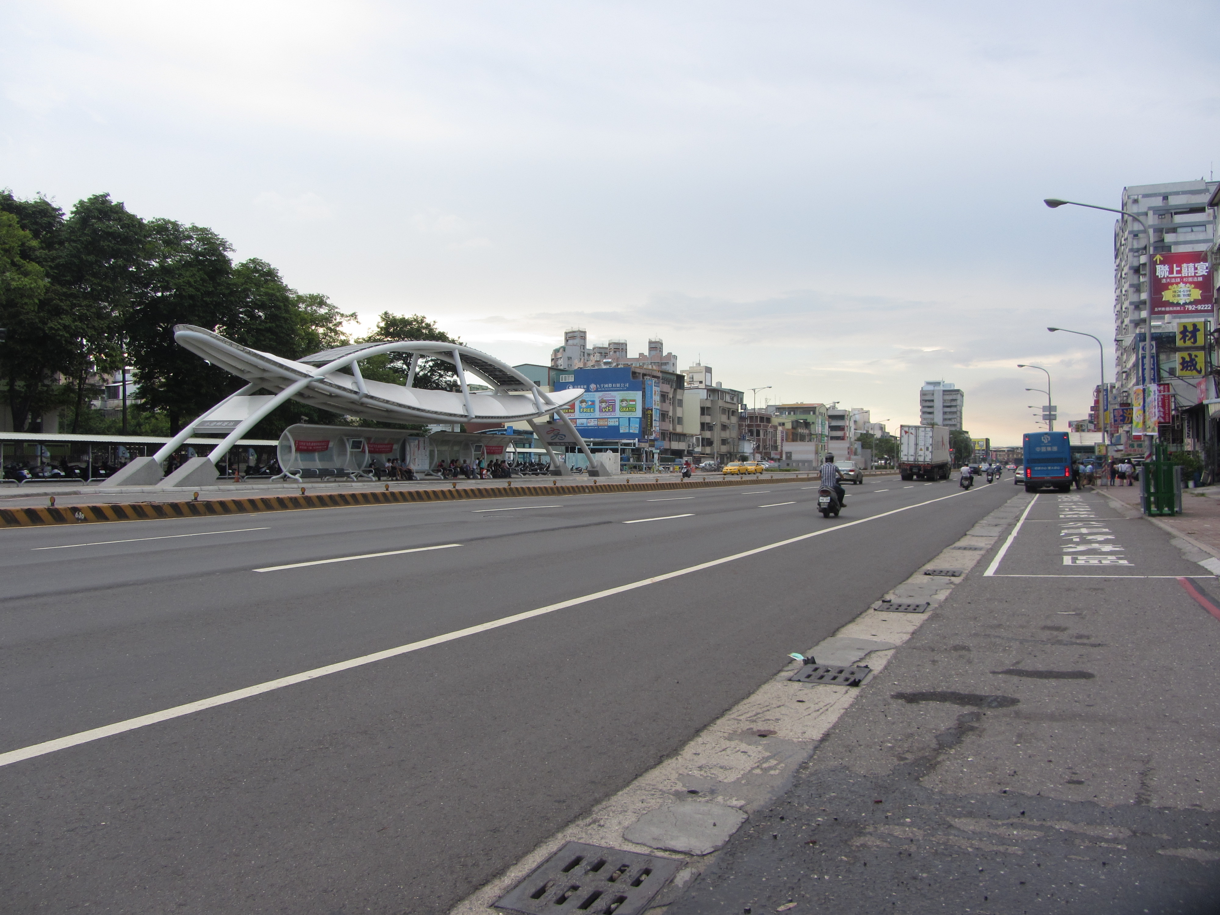 高雄市小港區沿海一路一景